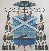 Stemma dell'Arcivescovo Girolamo D'Andrea